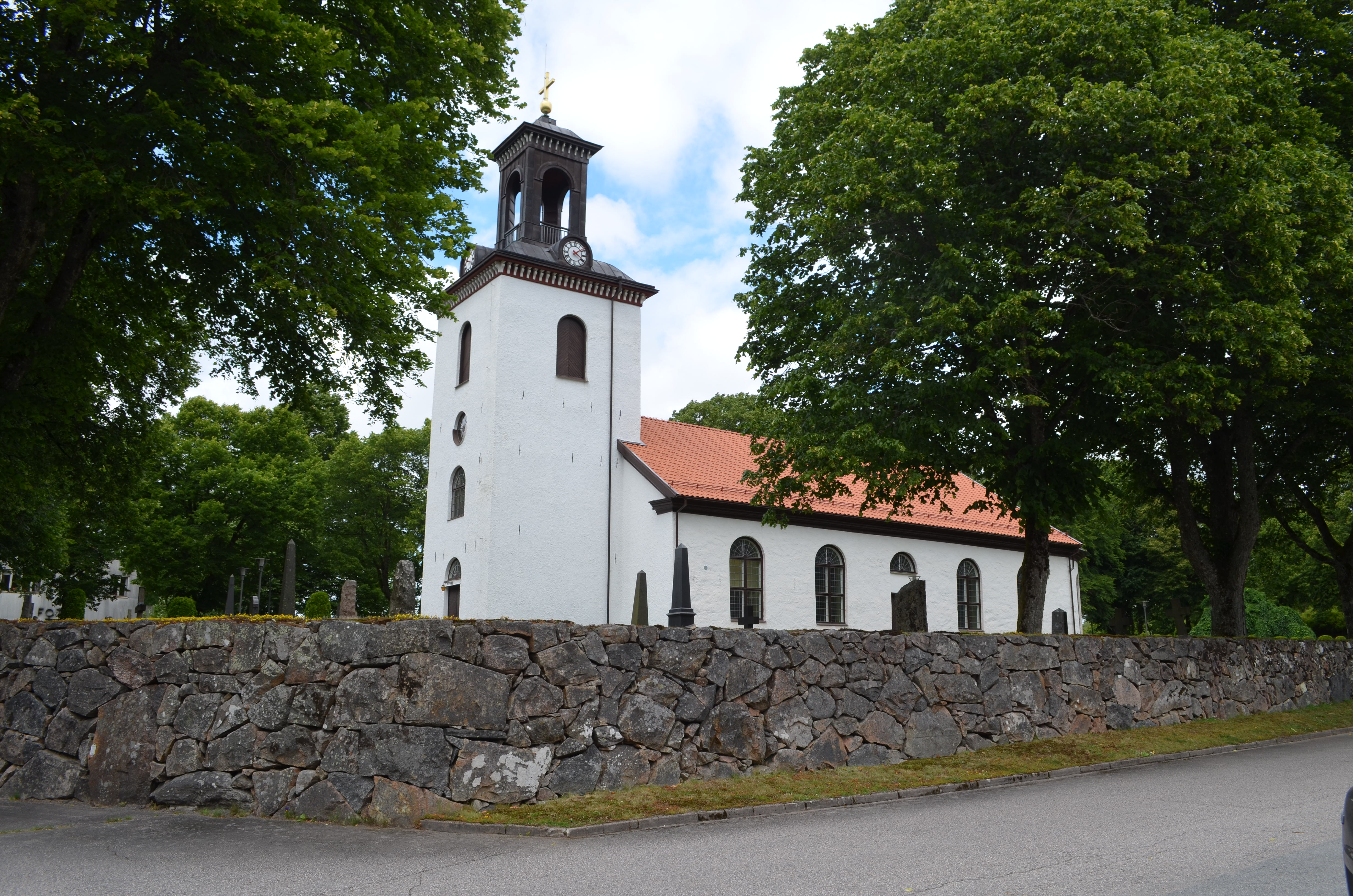 Fritsla kyrka 2017